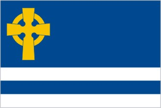 Kučeř